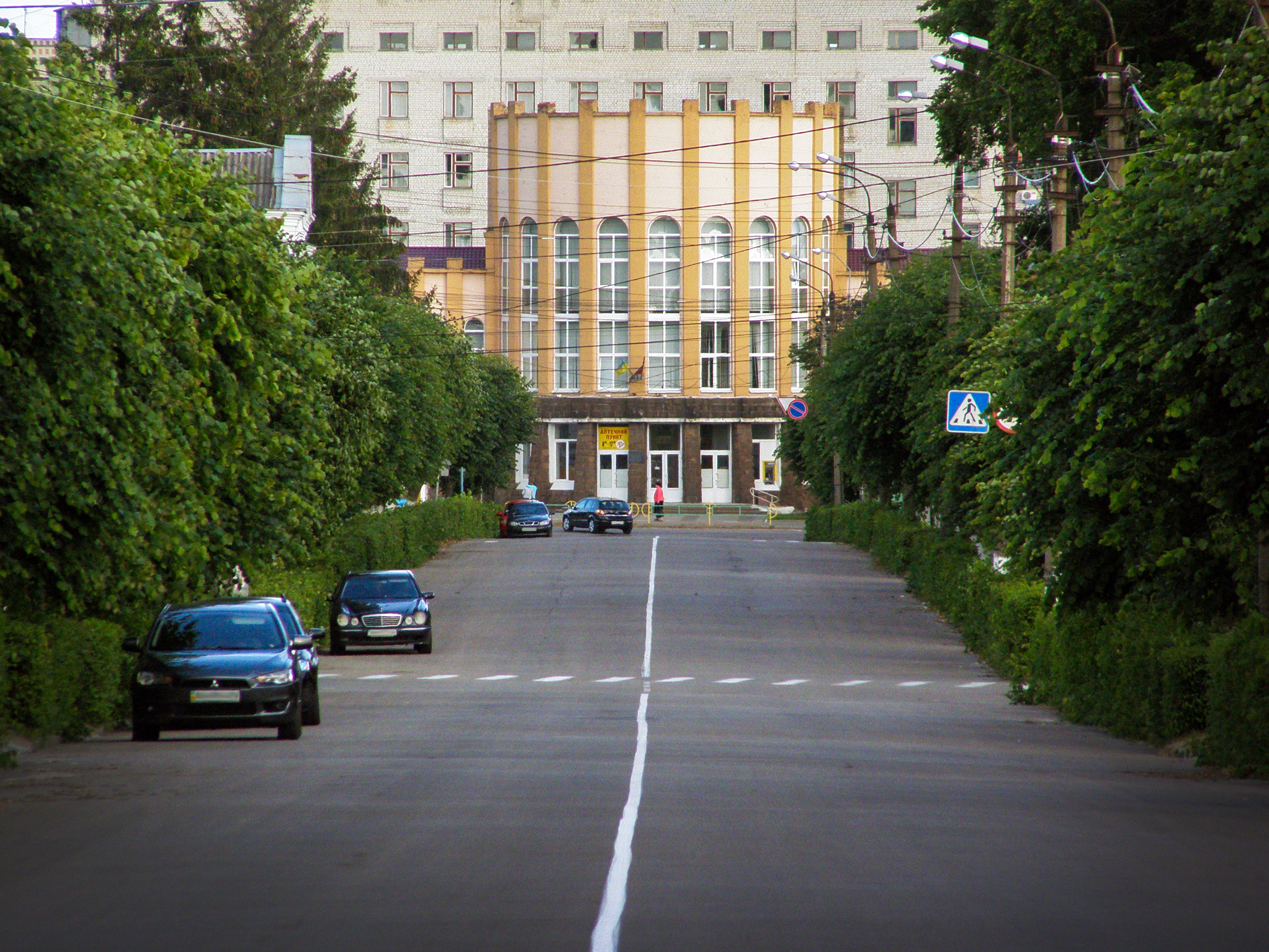 Будівля окружного суду (нині дитяча поліклініка), Коростень, вул. Грушевського, 7